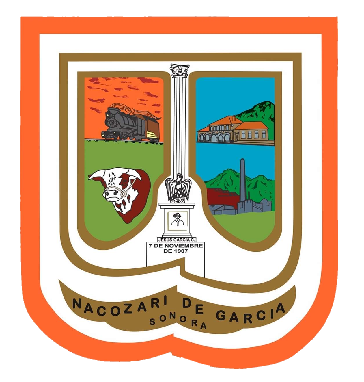 Escudo de armas oficial del municipio sonorense de Nacozari de García, rediseñado por el ayuntamiento en turno del periodo 2015-2018.